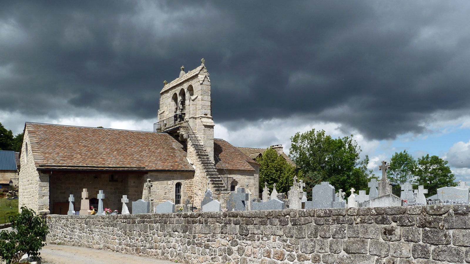 Eglise du Fau de Peyre et son magnifique clocher peigne.